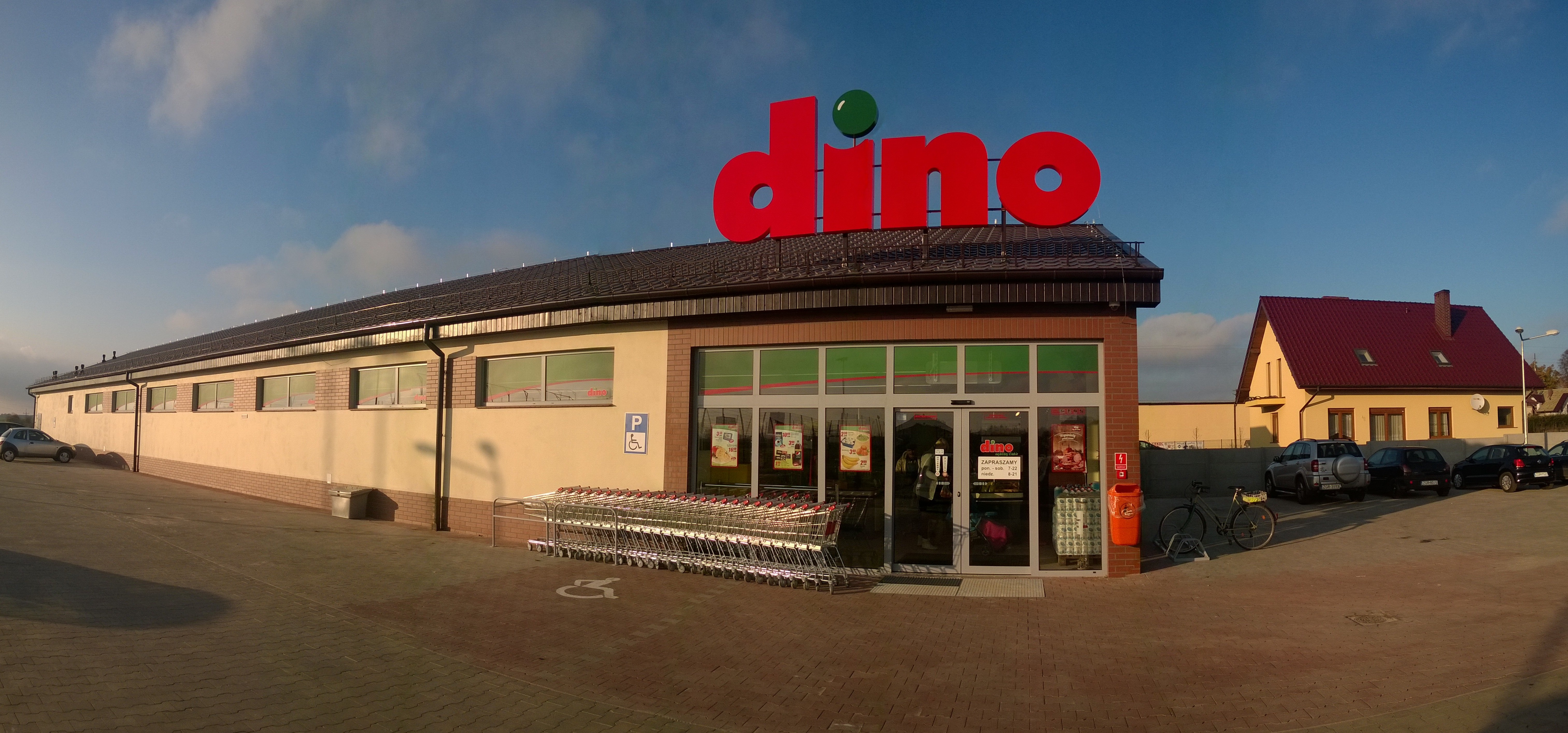 Moryń - Sklep Dino